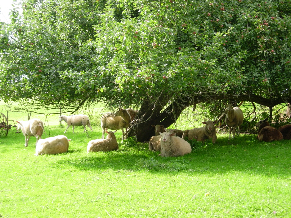 Schafe auf einer Streuobstwiese auf der Schwäbischen Alb